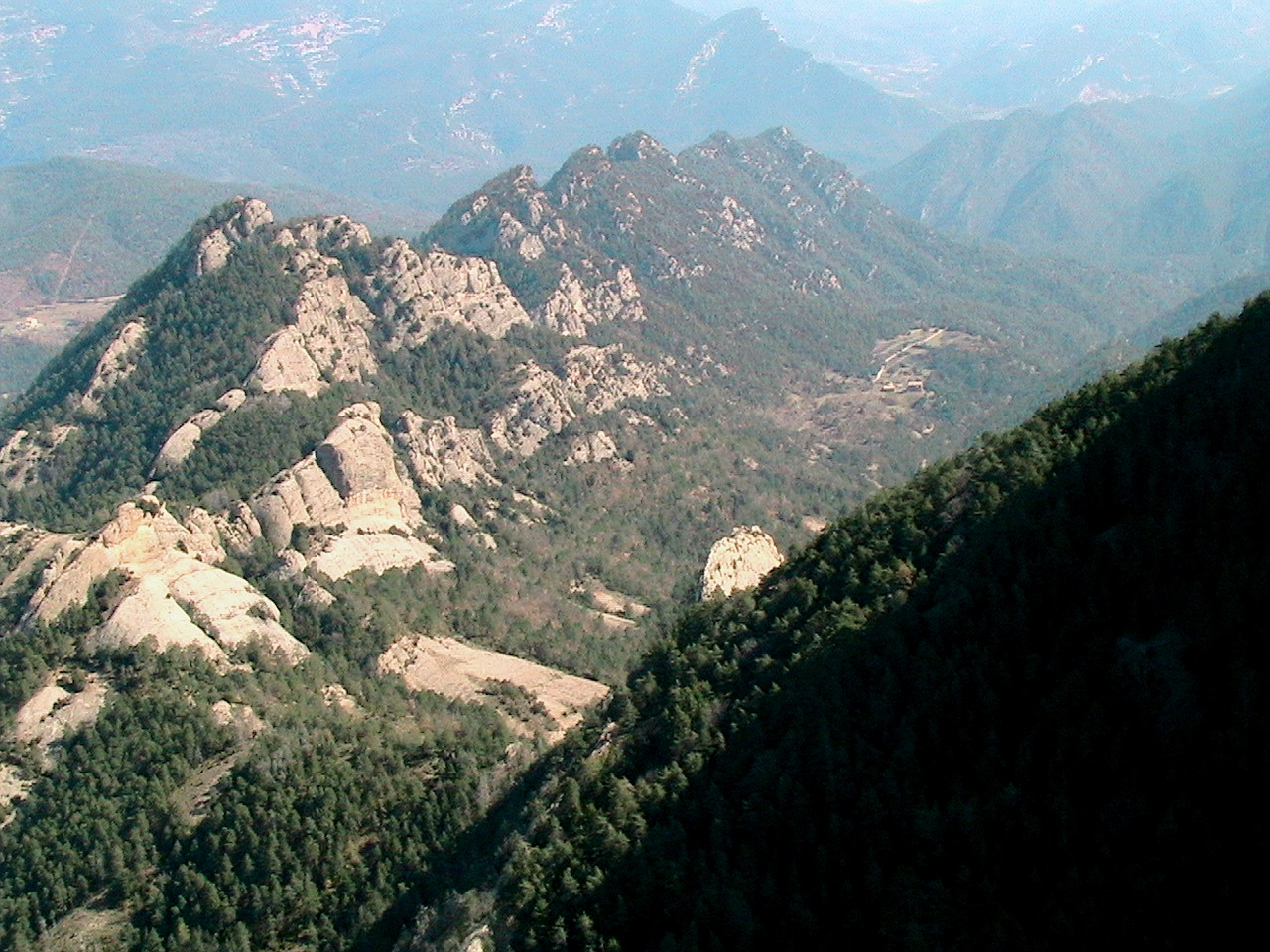 El Clot de Valielles vits des de Busa